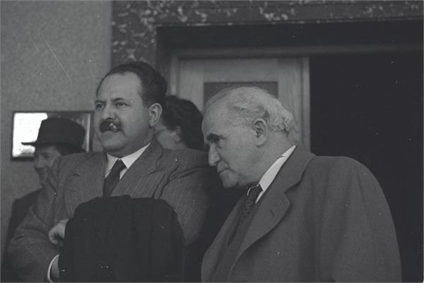 ירושלים - מר בן גוריון ומר סנה ביום החלטת האו"מ על מדינה עברית